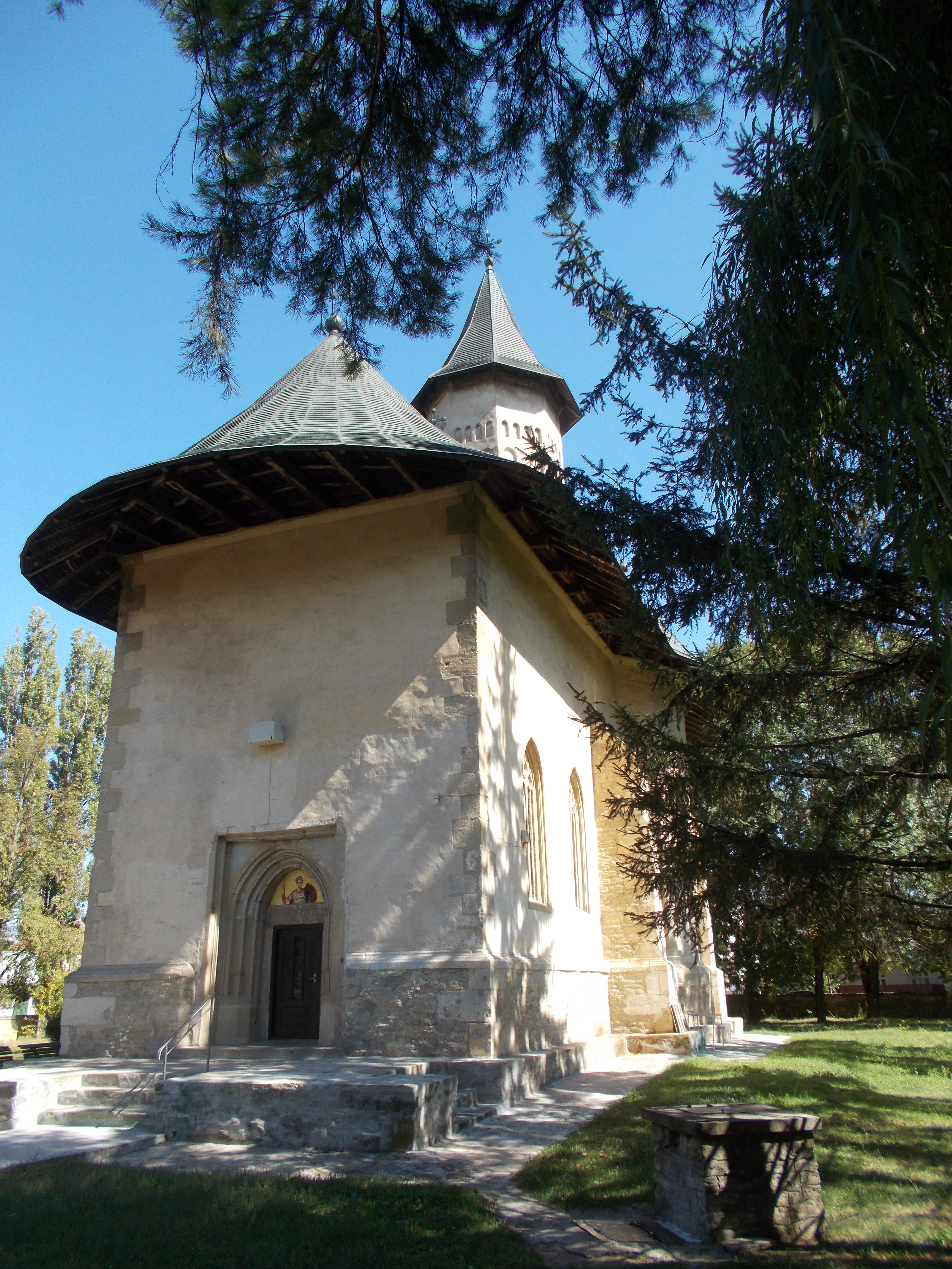 Biserica ”Sfântul Dumitru” din Hârlău, județul Iași